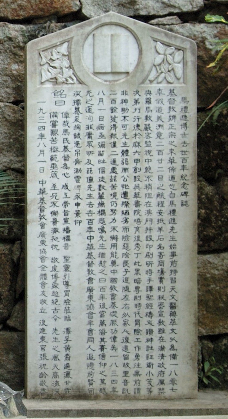 中文（香港）: 立於澳門基督教墳場的馬禮遜紀念碑